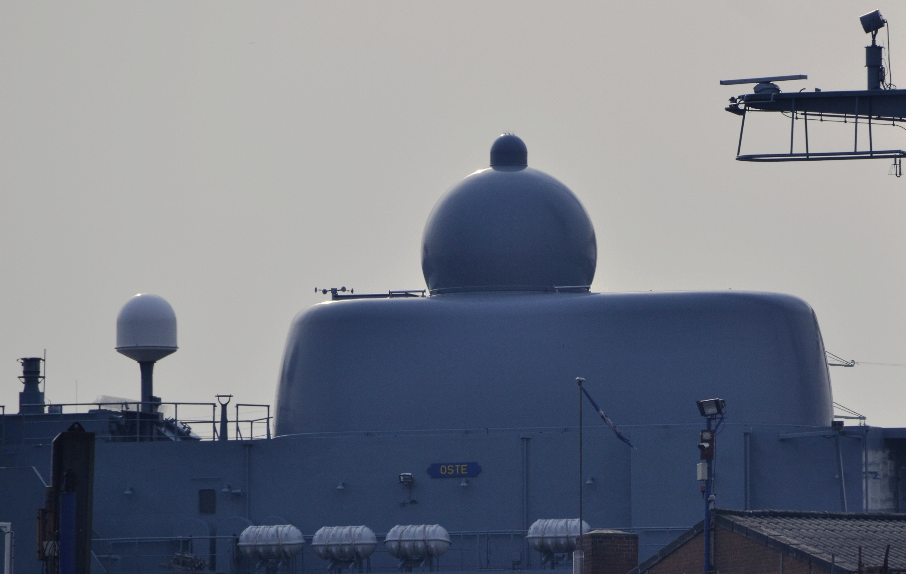 Die A52 Oste im Trockendock in Hamburg.